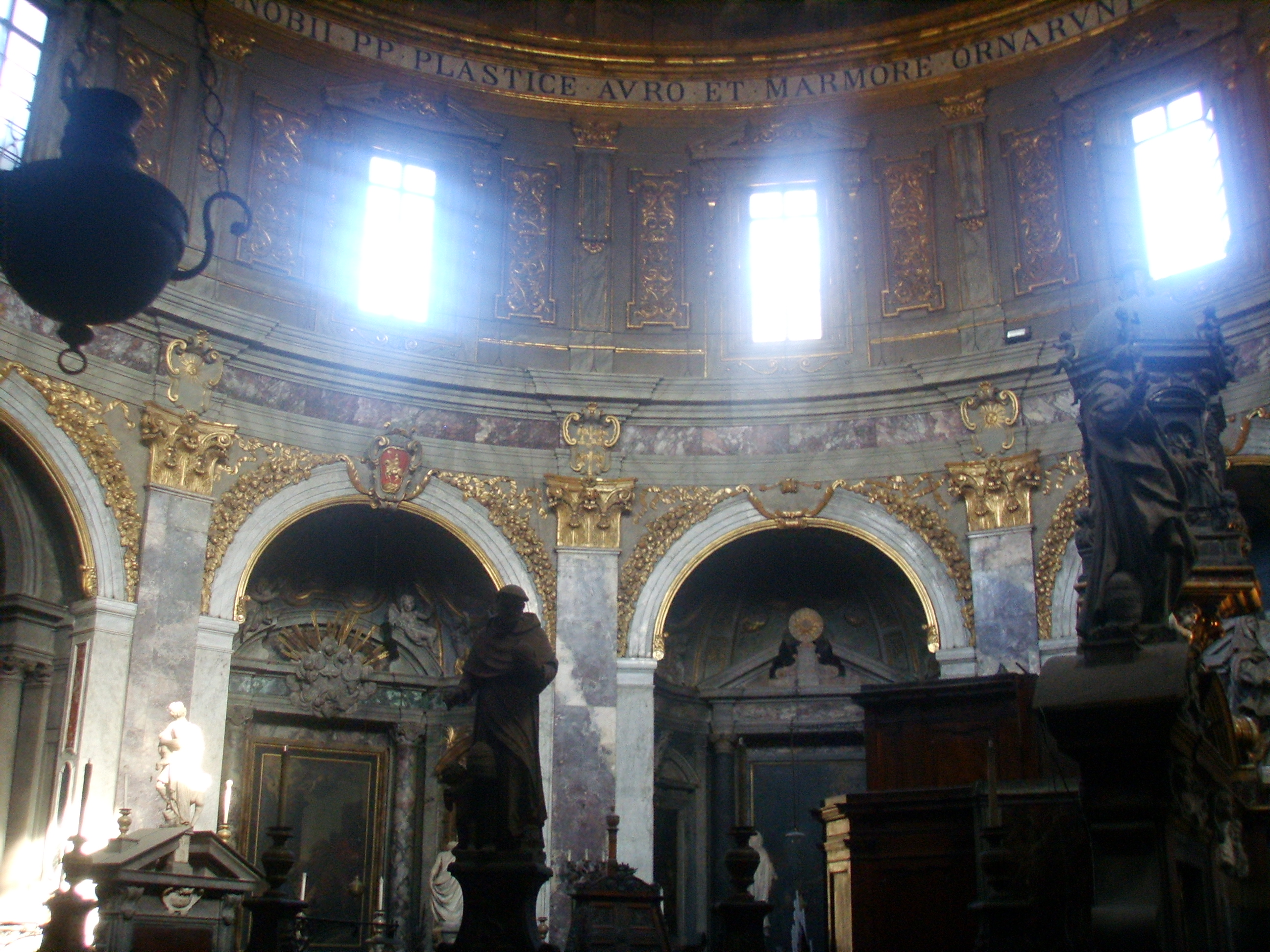 Santissima annunziata abside in Florence, italy